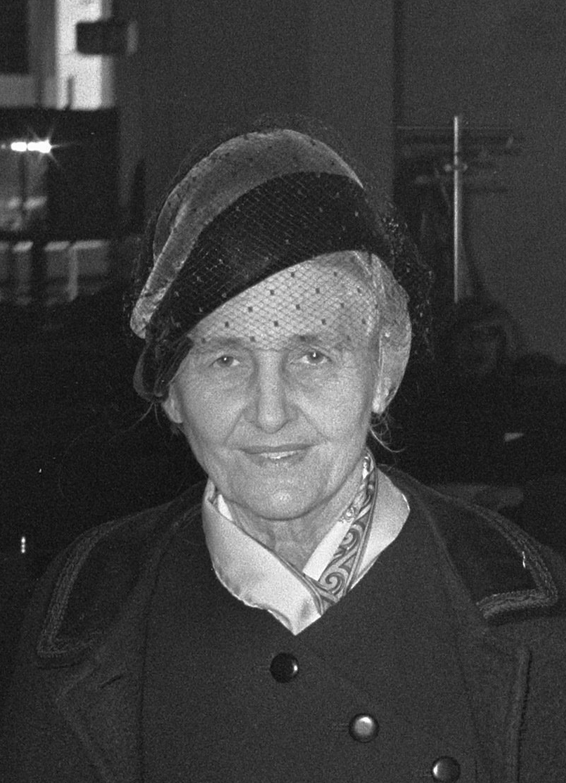 Ouders en zusters van prins Carlos Hugo vertrekken van Schiphol. Prinses Madeleine van Bourbon Parma, prins Xavier en prinses Marie des Neiges